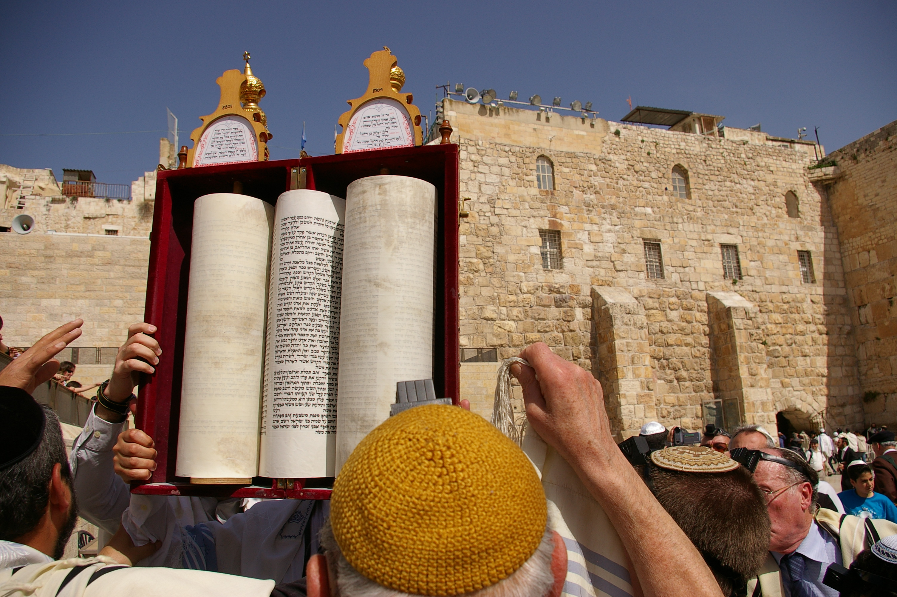 Sefer Torah durant une bar-mitzwah au Mur